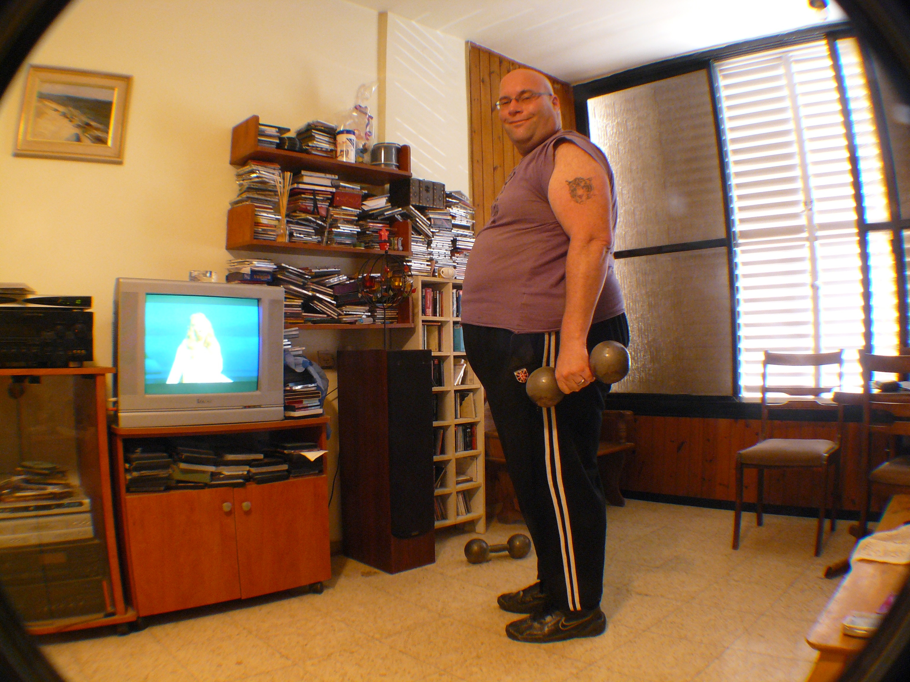 חלומות של דובים